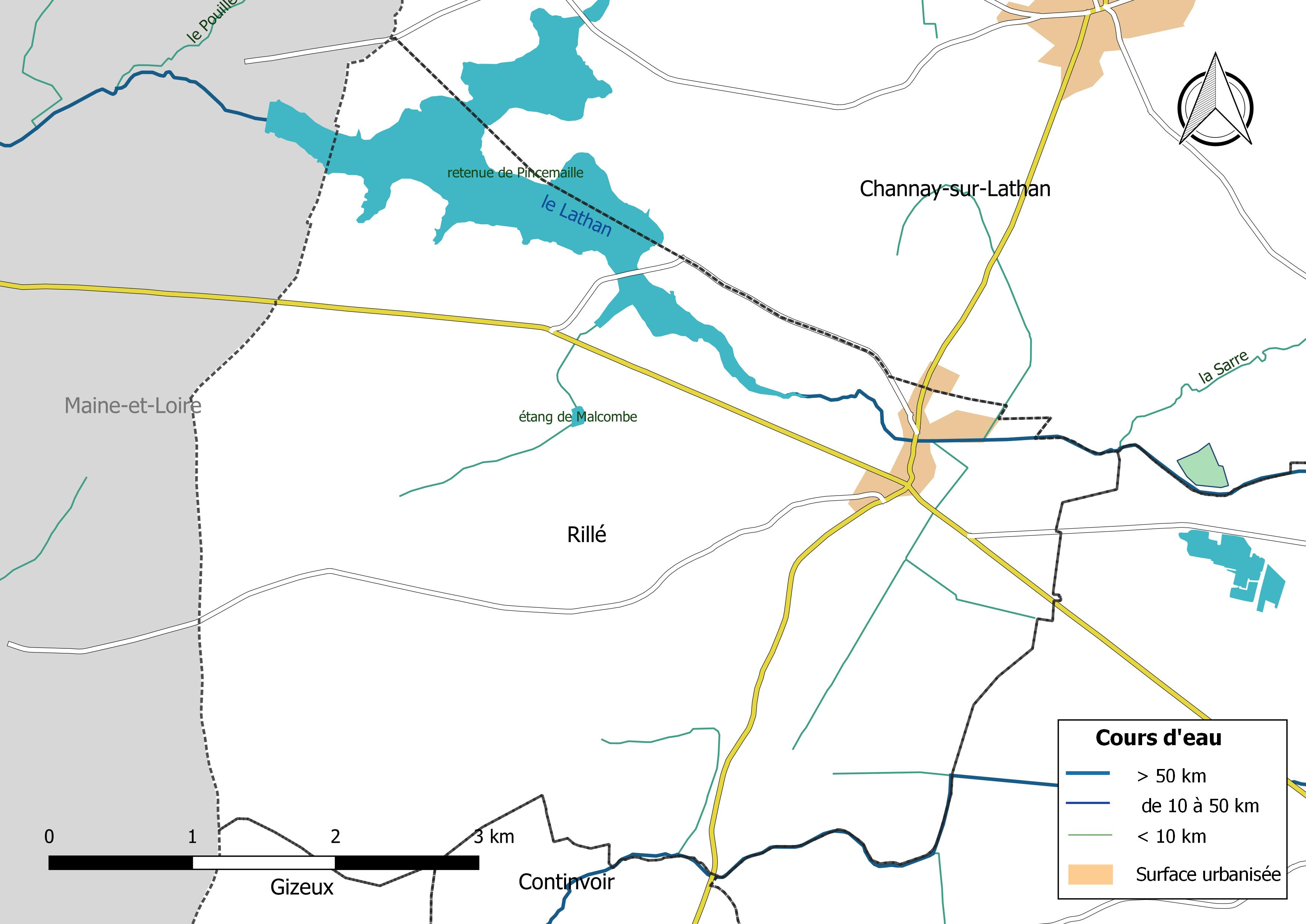 Carte du réseau hydrographique de la commune de Rillé (France).